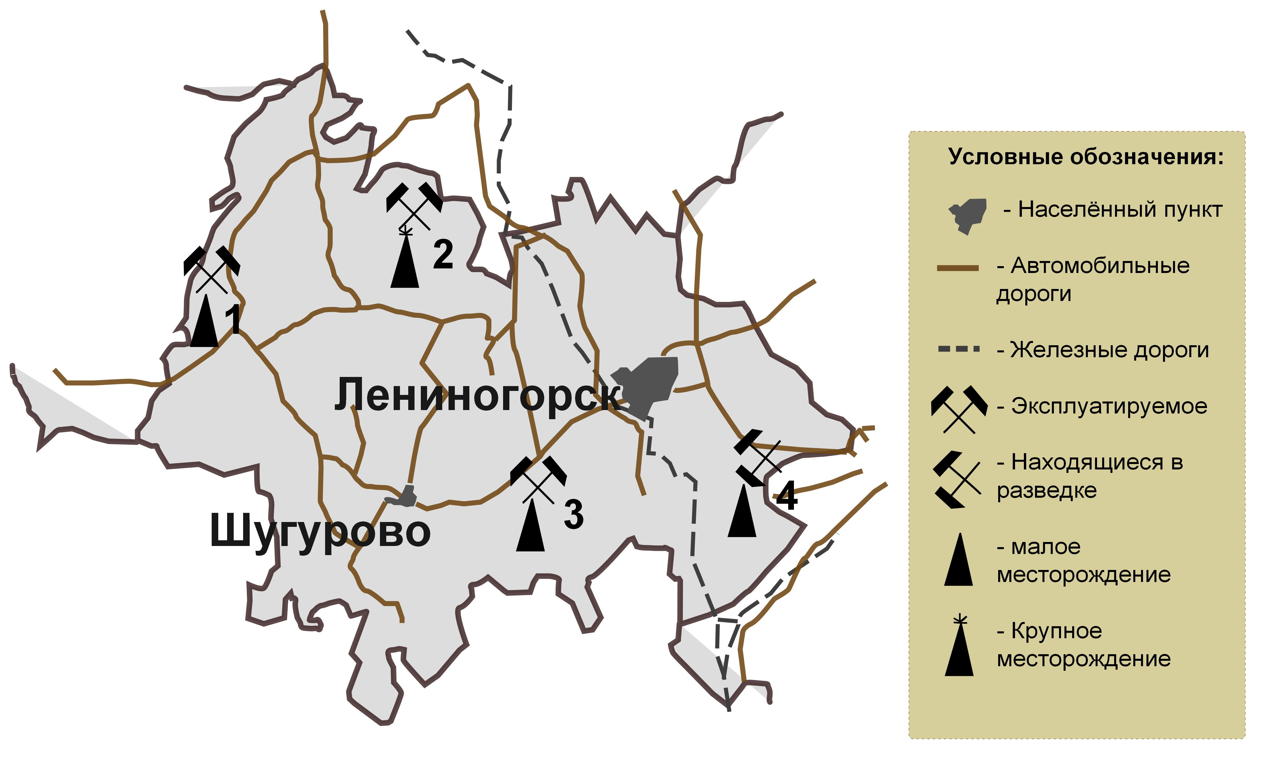 Карта нефтяных месторождений на территории Лениногорского муниципально образования в соответствии с данным "ВСЕГЕИ" на 2010 год.